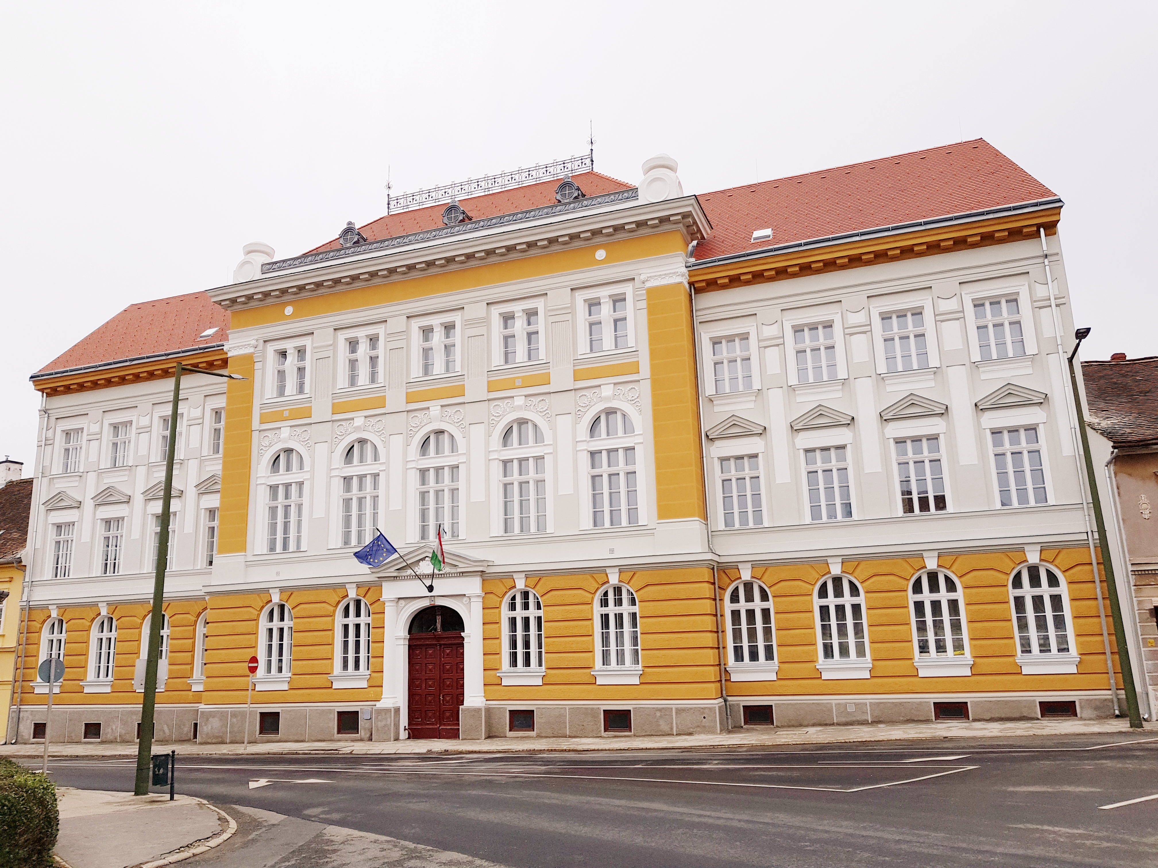 Kőszeg Evangélikus iskola felújítás után